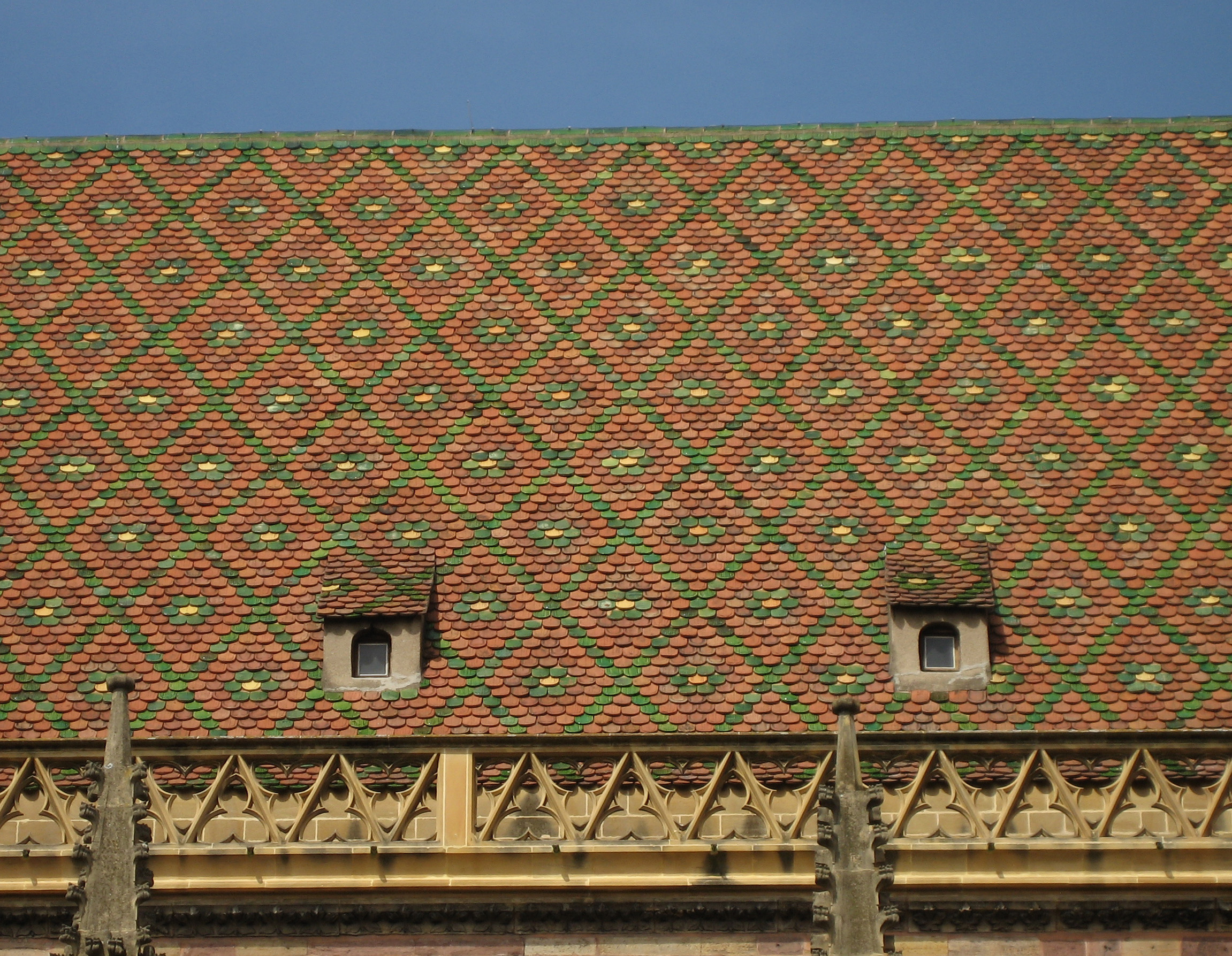 IMG_8277tr